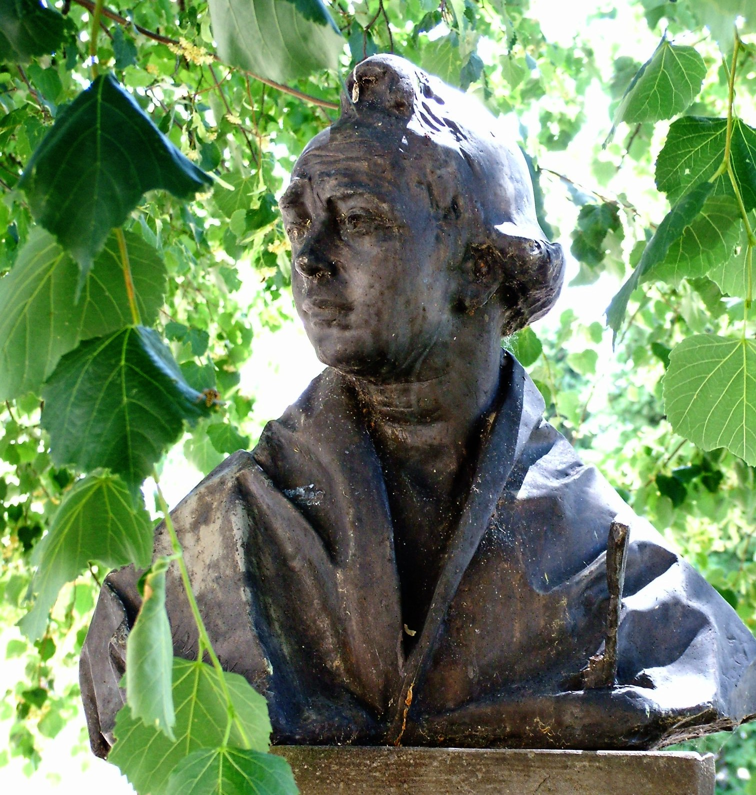 Franz Anton Maulbertsch sümegi mellszobra, Marton László alkotása, 1991-ben avatték fel